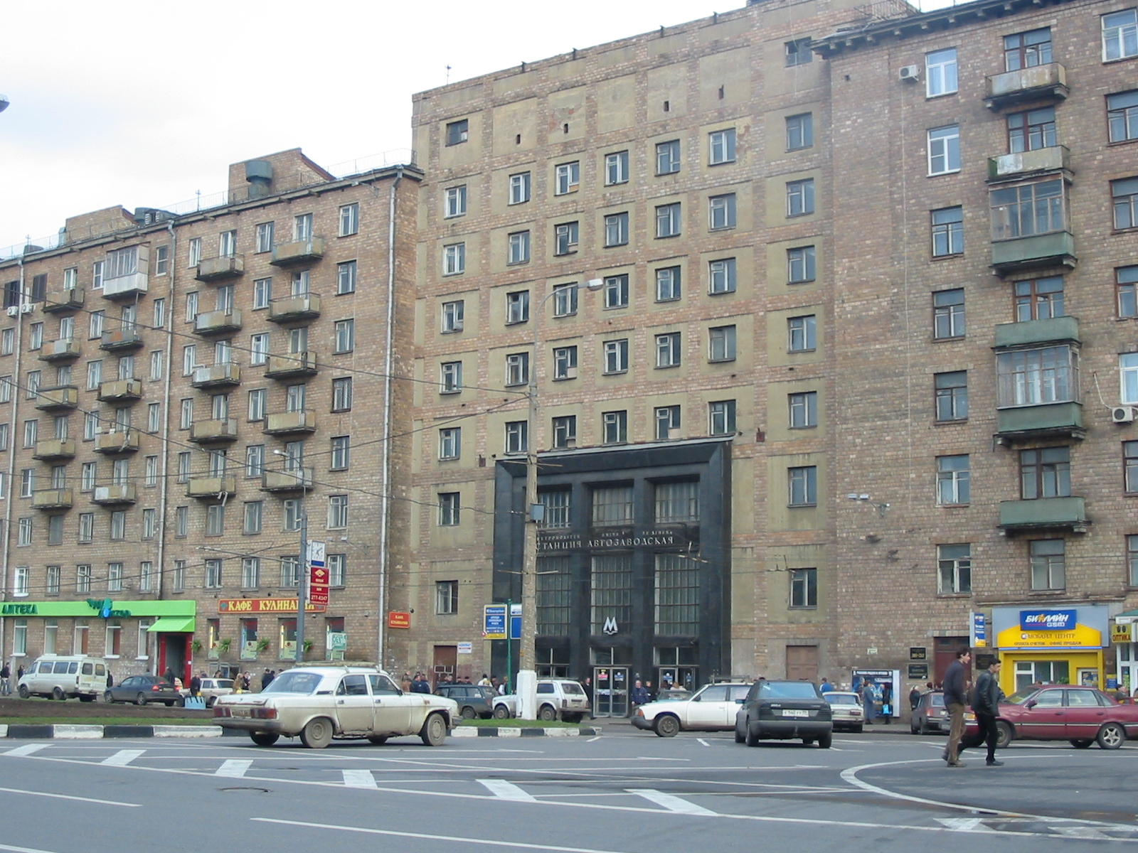 Станция Автозаводская, 2003 год